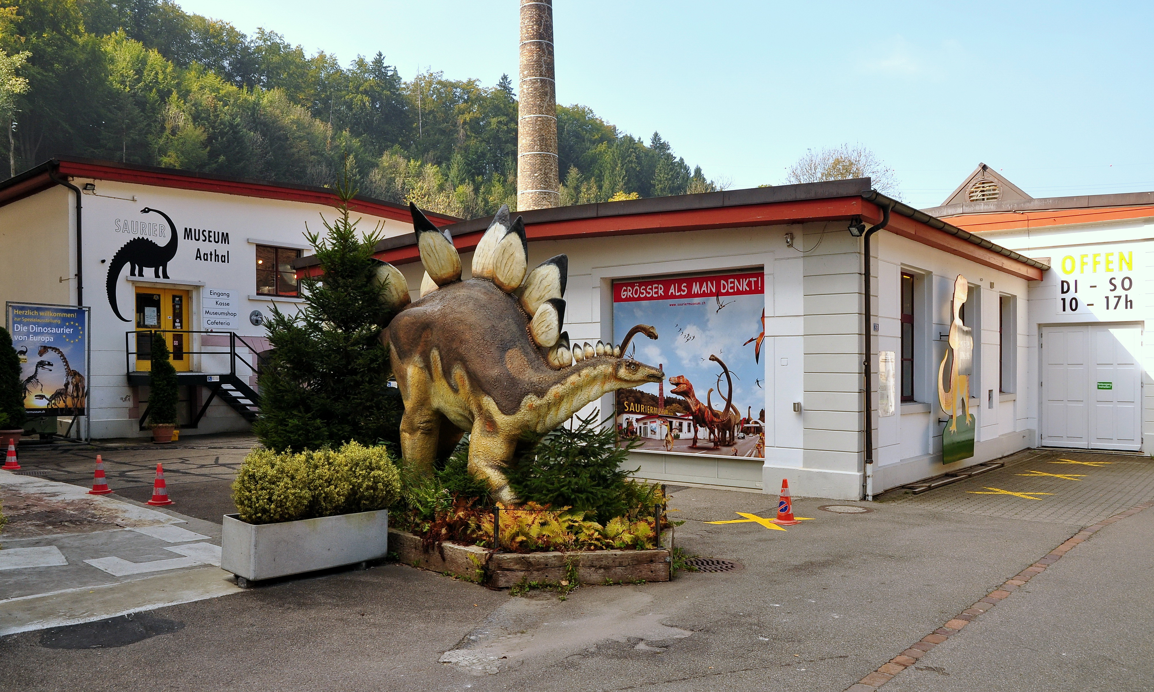 Sauriermuseum Aathal, Zürichstrasse / Unter Aathal 202 in Aathal-Seegräben (Switzerland)